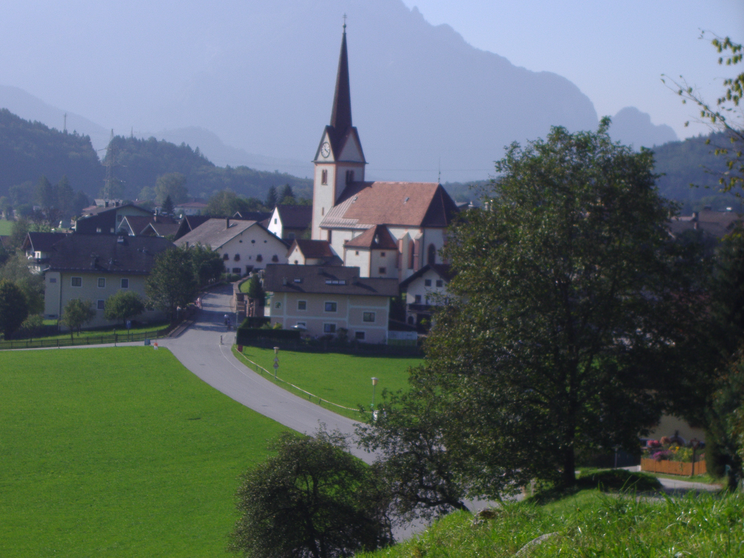 Das Ortszentrum von Adnet von Waidach aus gesehen